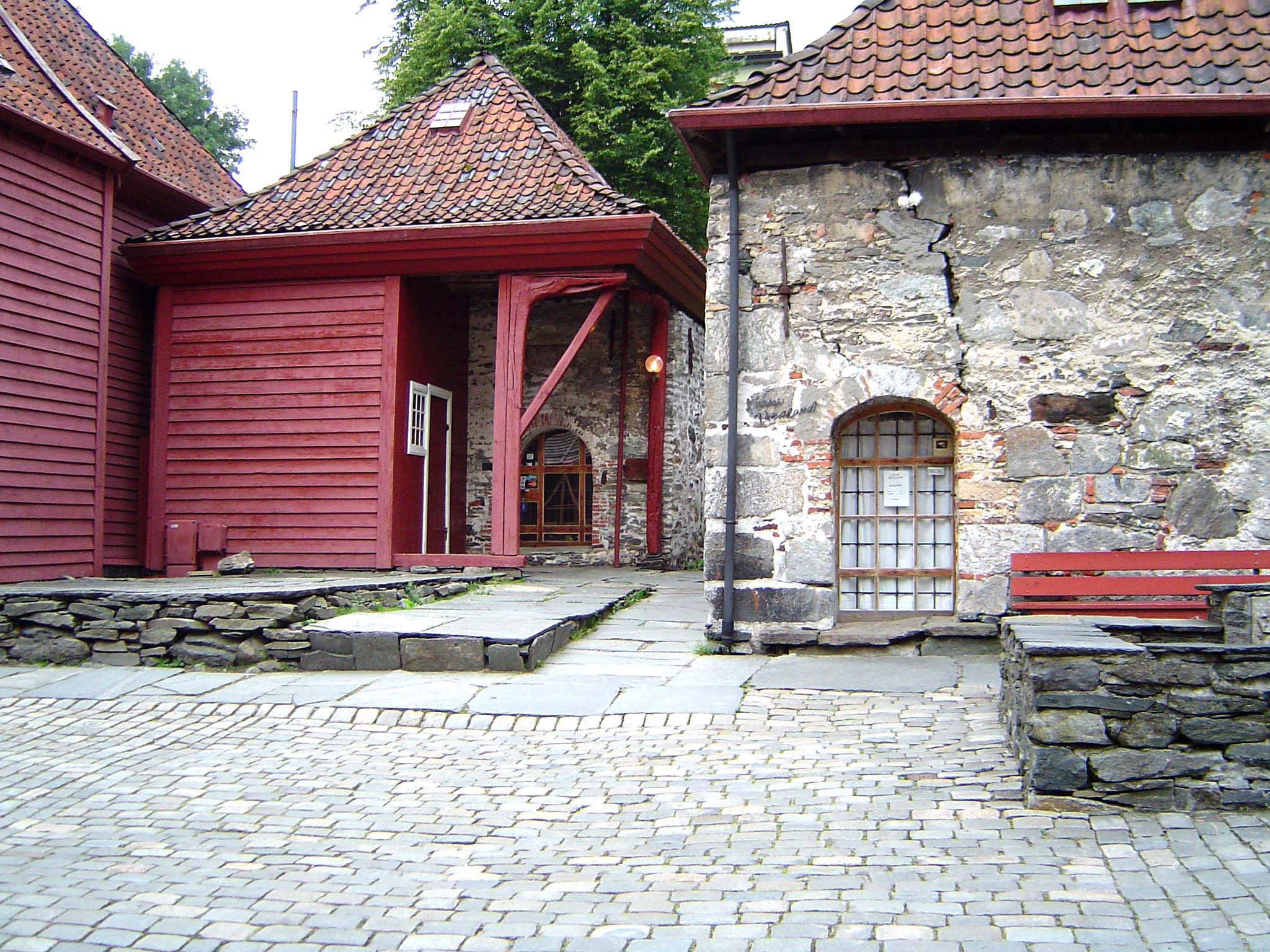 E Bannenhaff zu Bryggen.